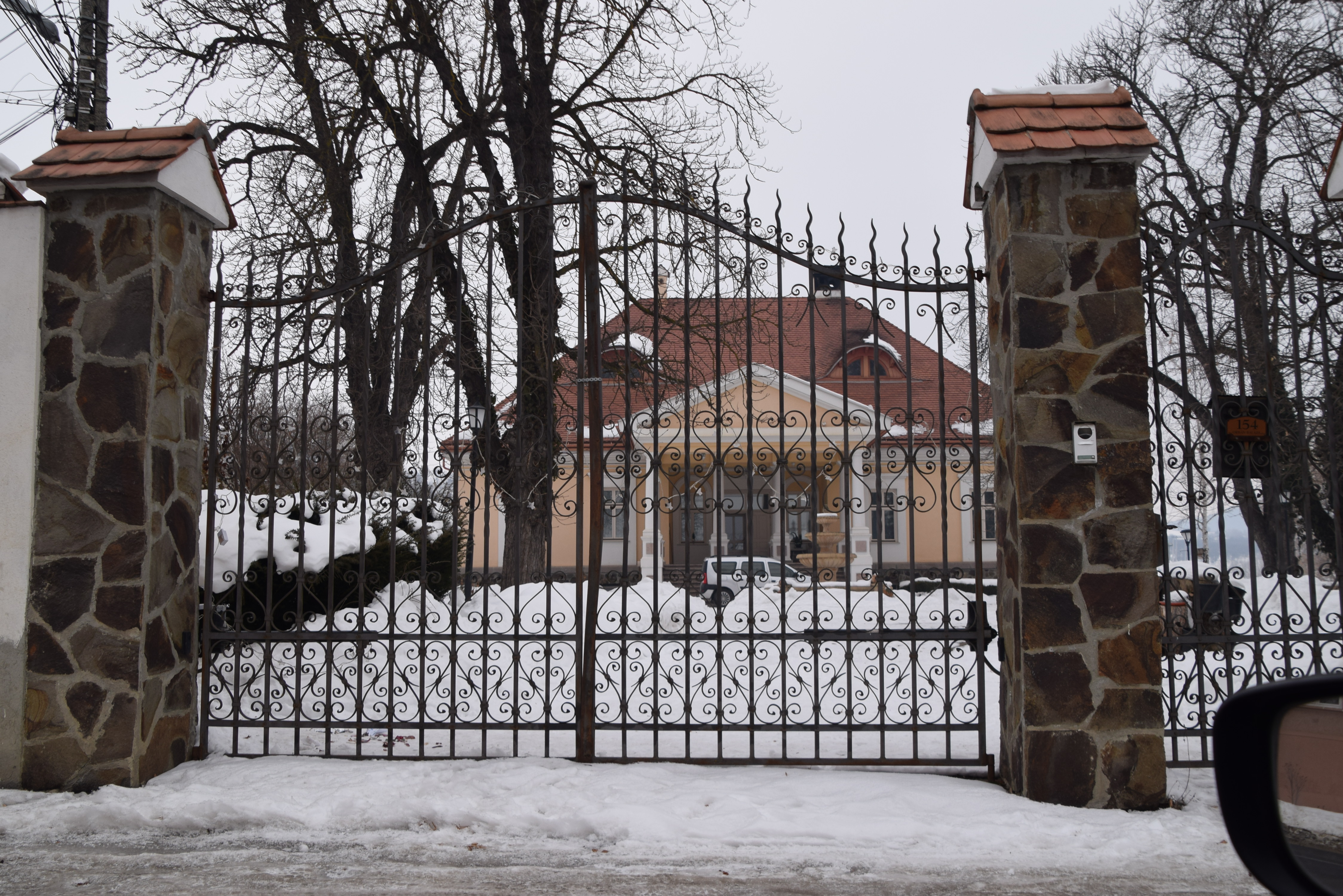 Conacul Ugron